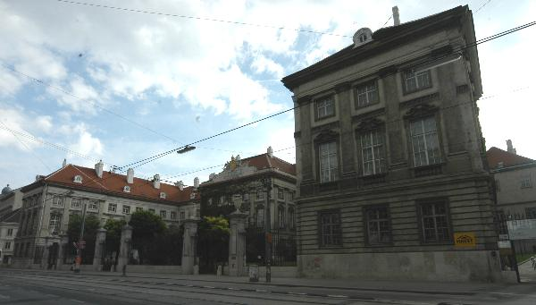 Josephinum